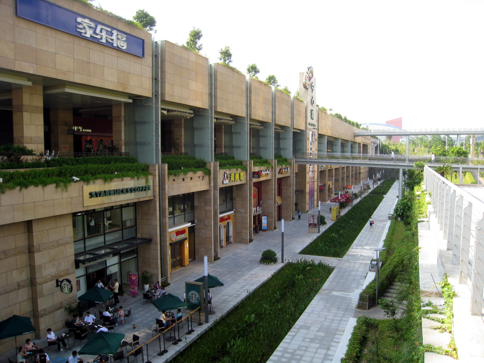 Central Walk Shenzhen